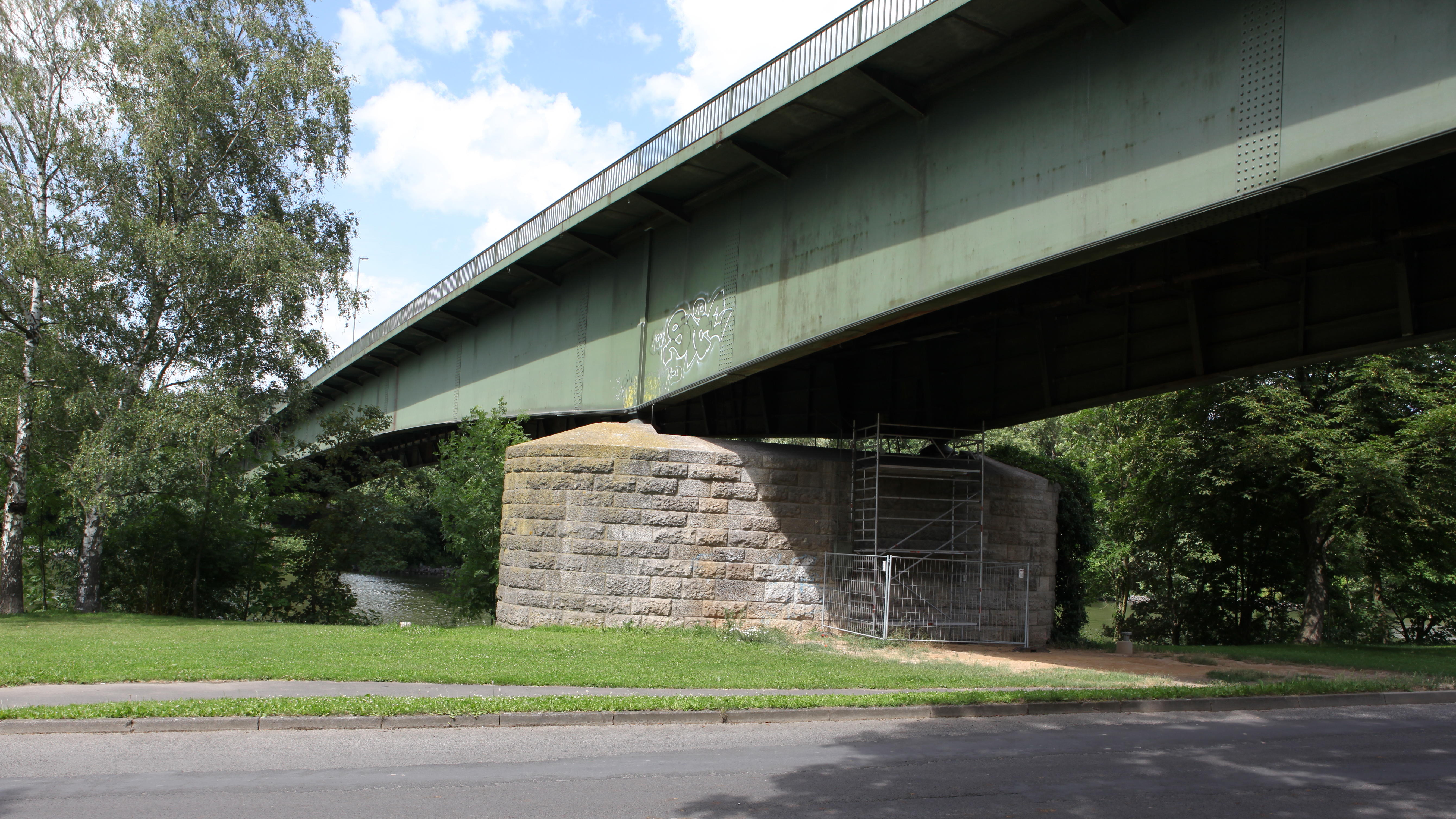 Neue Mainbrücke Ochsenfurt, Landkreis Würzburg